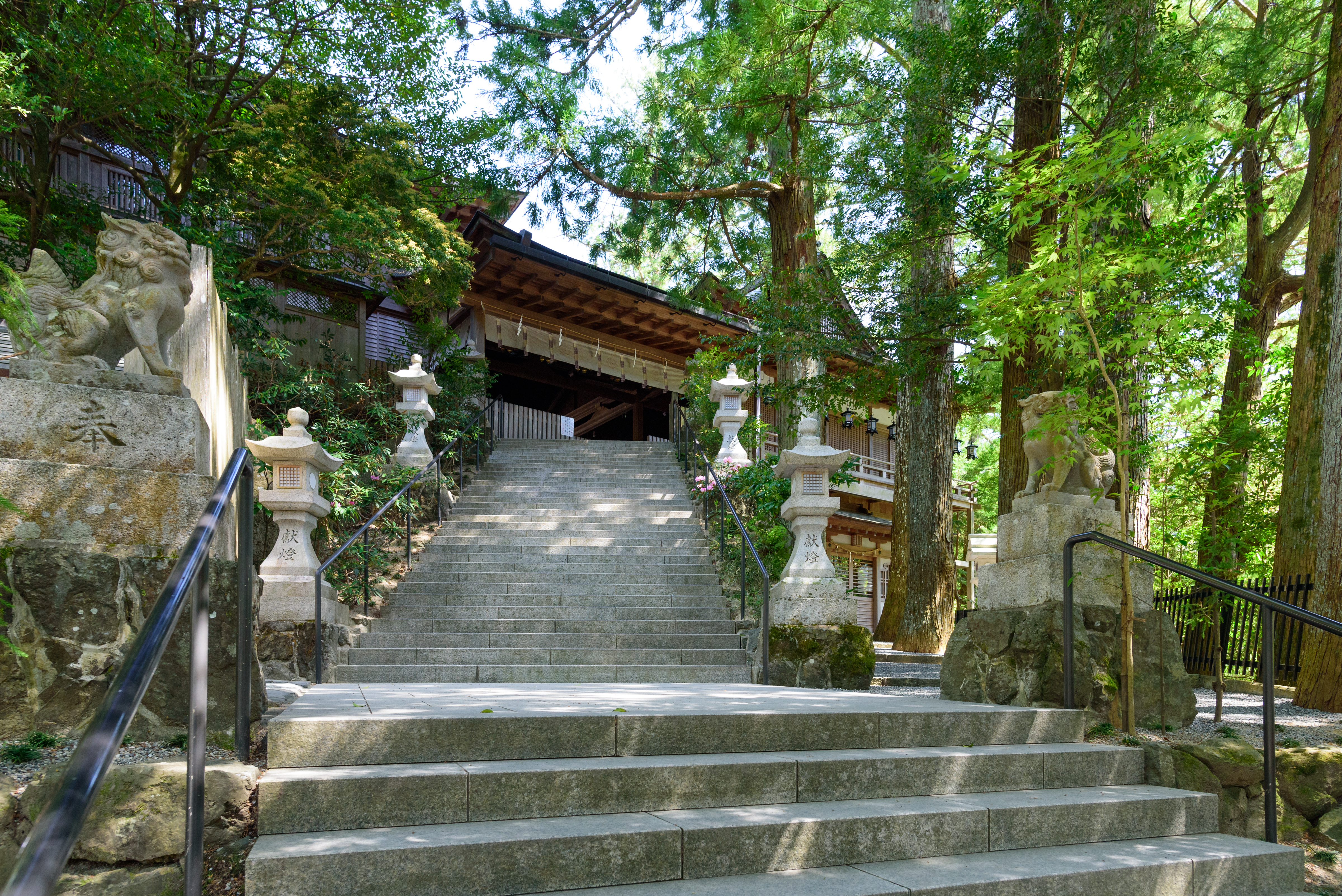 天河大辯財天社本殿